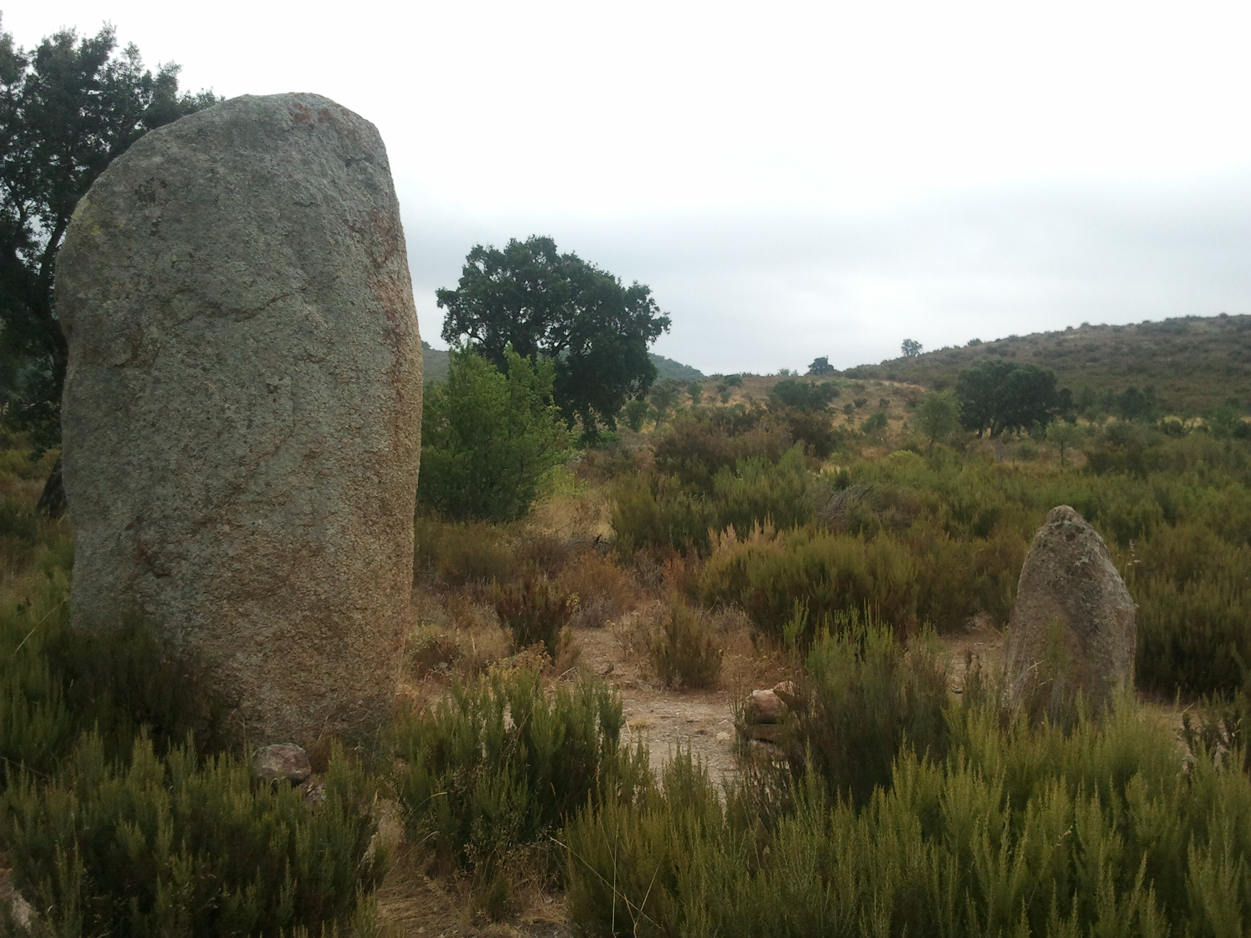 Menhir de la Murtra, al terme municipal de Sant Climent Sescebes, Alt Empordà.